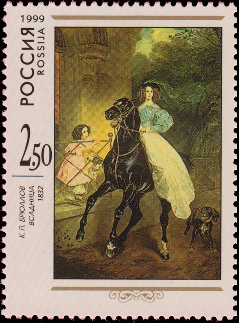 «Всадница».